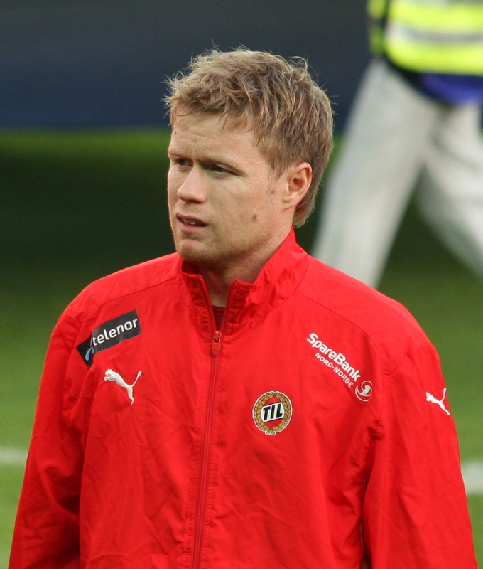 Tom Høgli, Norwegian player for Tromsø IL